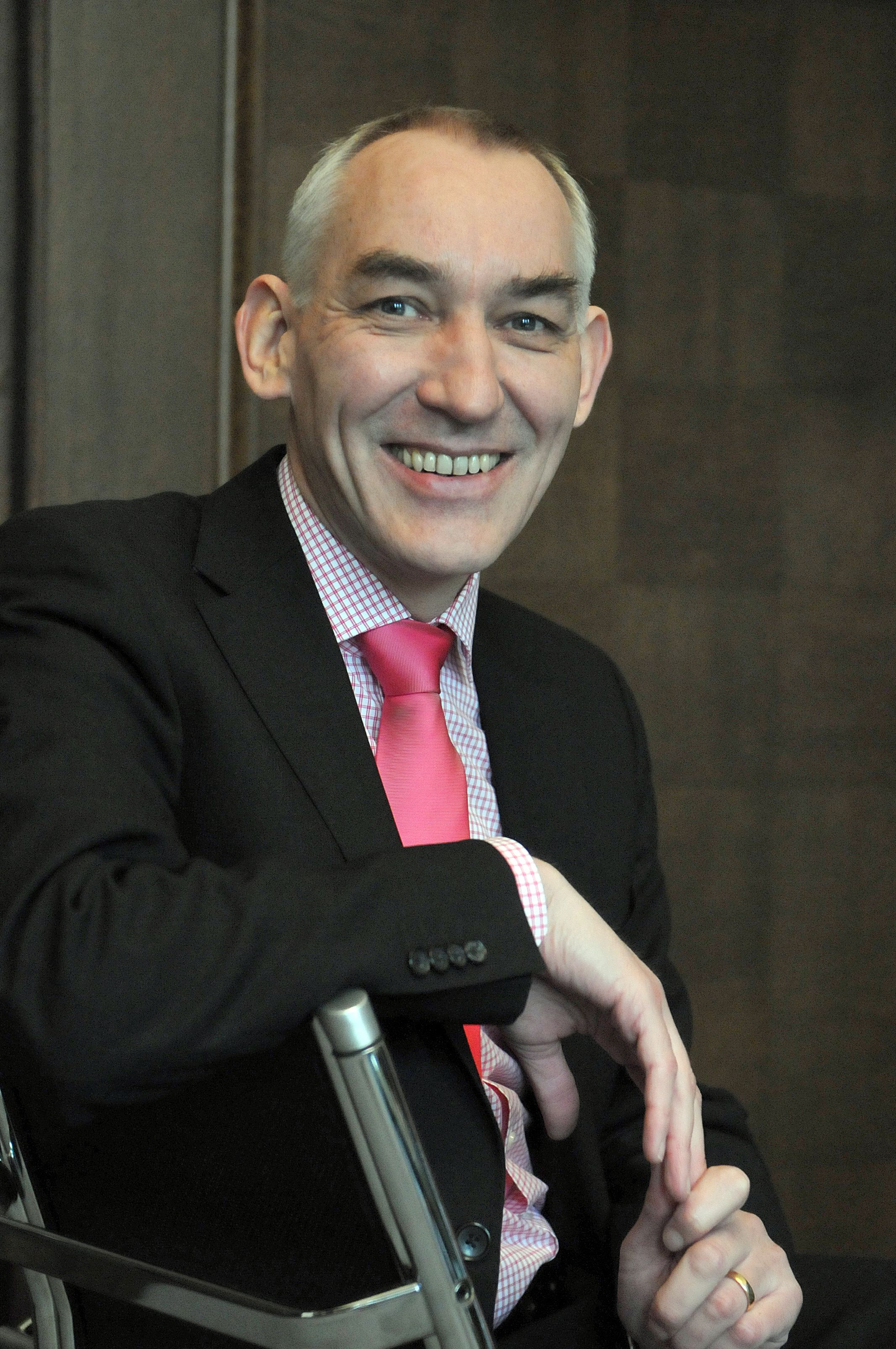 Schwertes Bürgermeister Heinrich Böckelühr